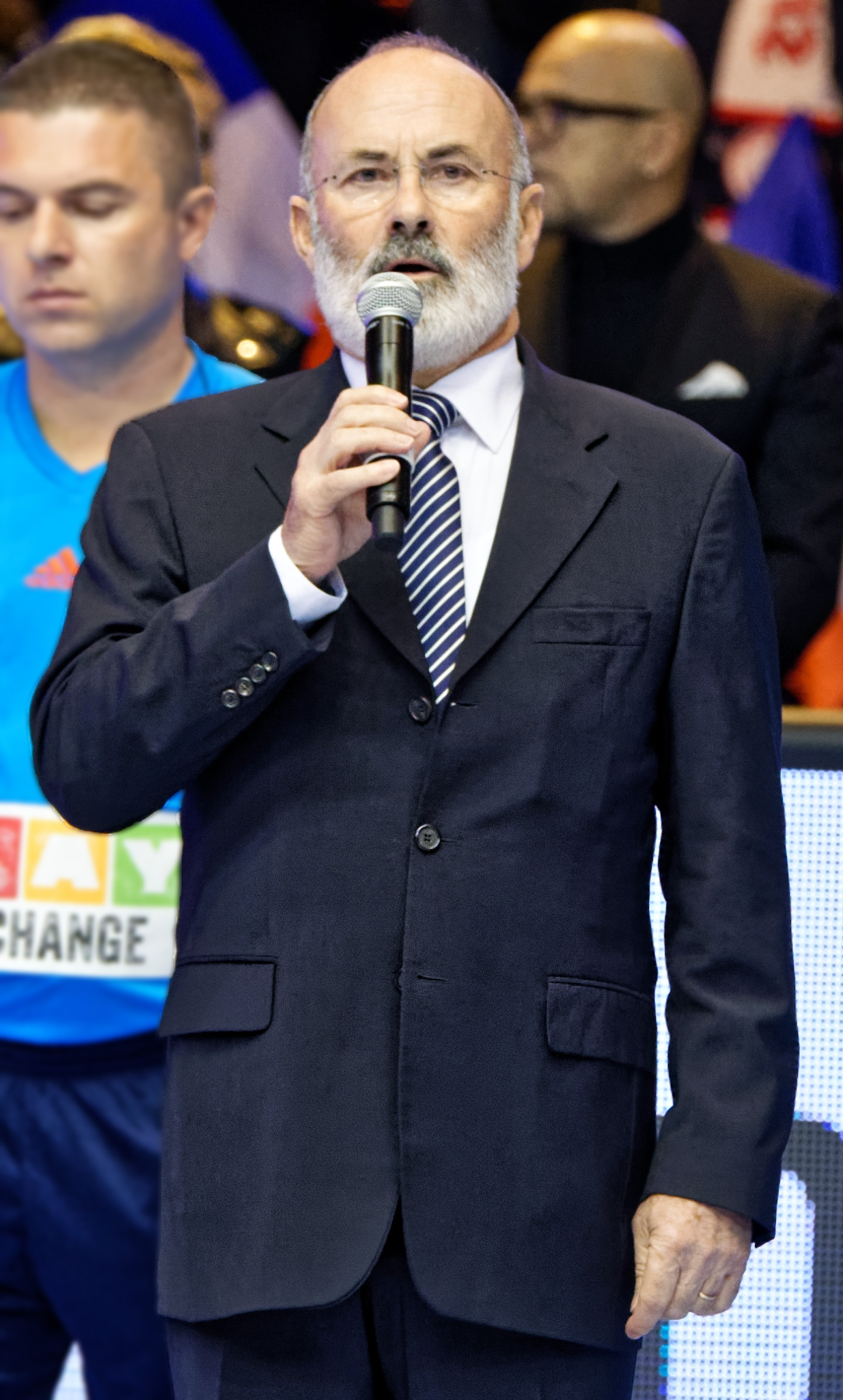 Jean Brihault, président de la fédération européenne de handball de 2012 à 2016. En préambule du match de phase de groupe de ligue des champions 2015-16 PSG / SG Flensbourg, à la Halle Carpentier (Paris), le 21 novembre 2015.